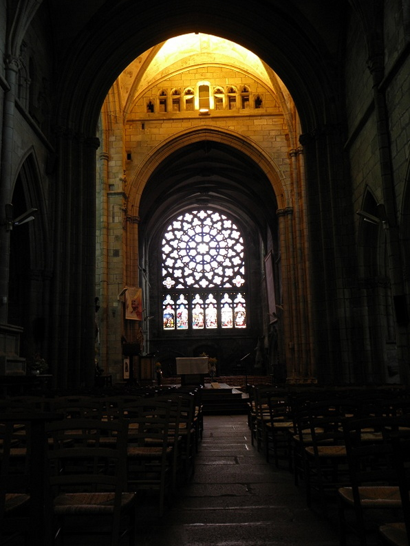 Croisée du transept et croisillon sud de la cathédrale Saint-Paul-Aurélien de Saint-Pol-de-Léon (29). .